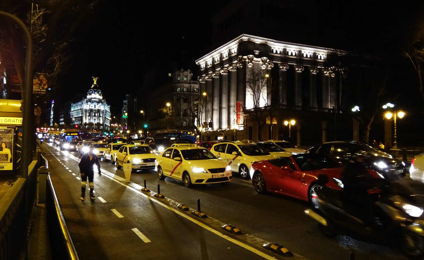 Вечерняя Alcala